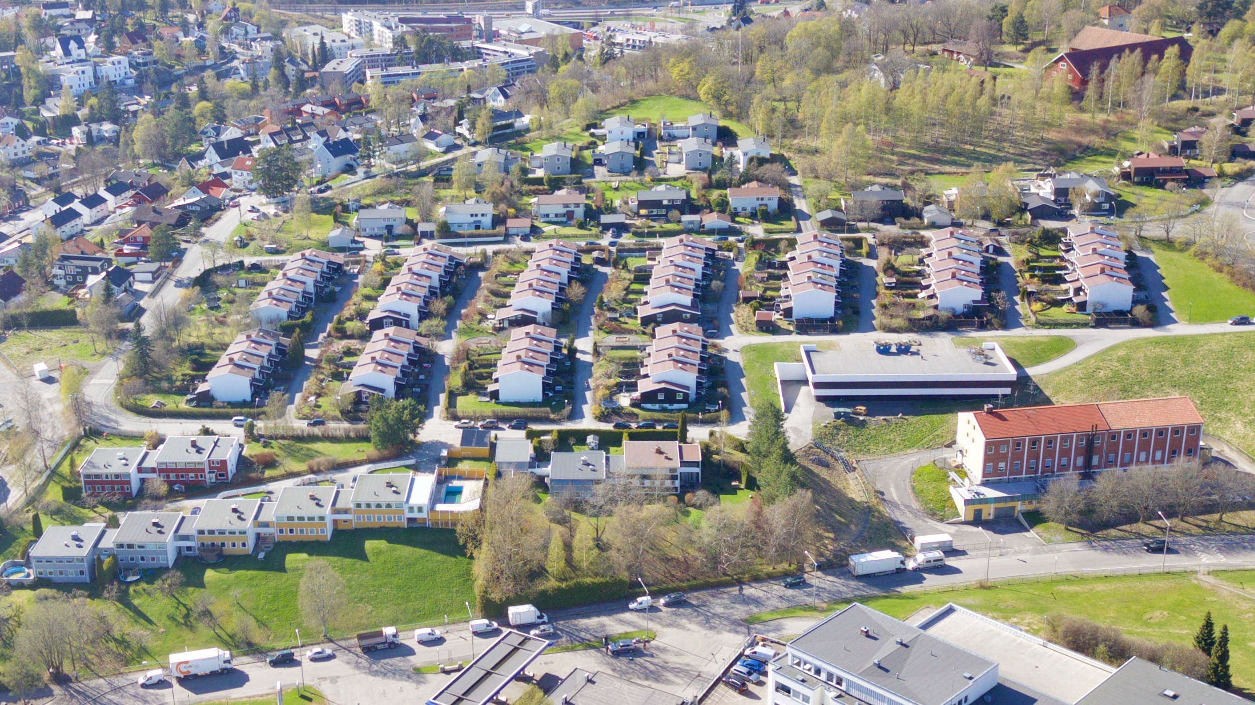 Låveveien, Terrasseveien, Axel Brinchs vei. Østensjø i Oslo.